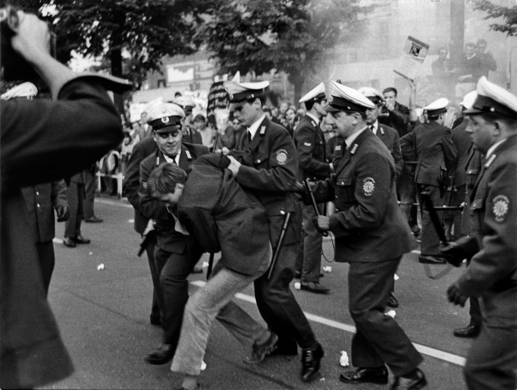 Ludwig Binder: Studentenrevolte 1967/68, West-Berlin; veröffentlicht vom Haus der Geschichte der Bundesrepublik Deutschland